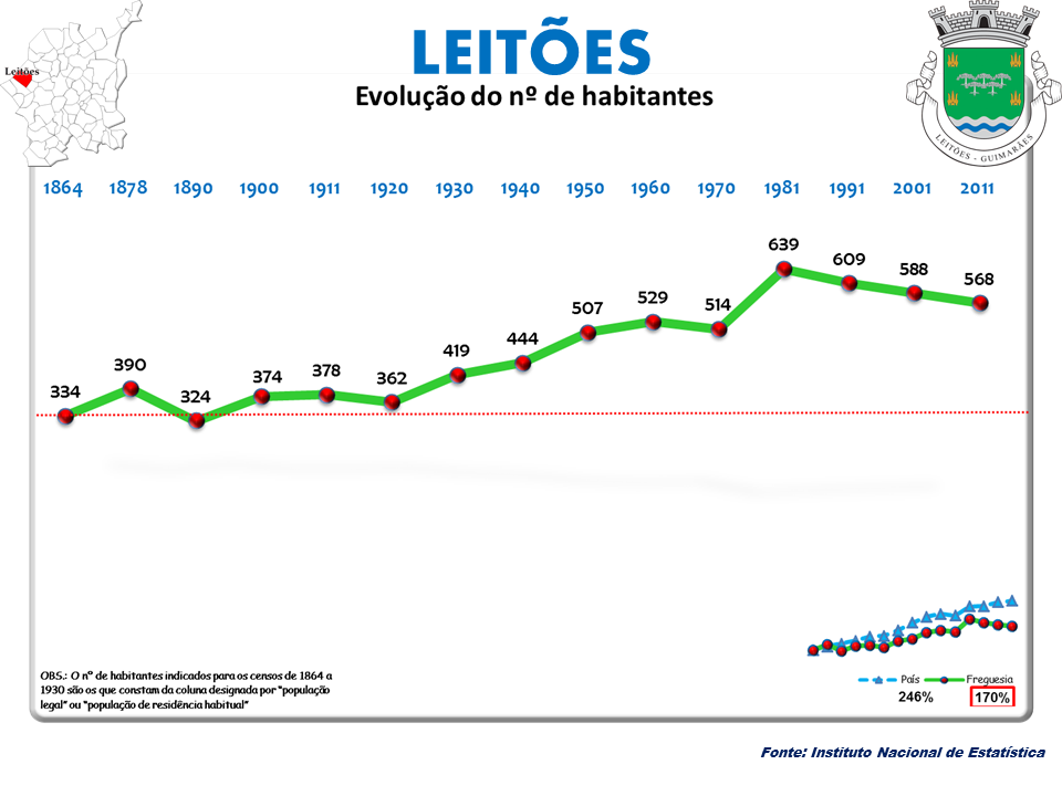 Evolução da População 1864 / 2011